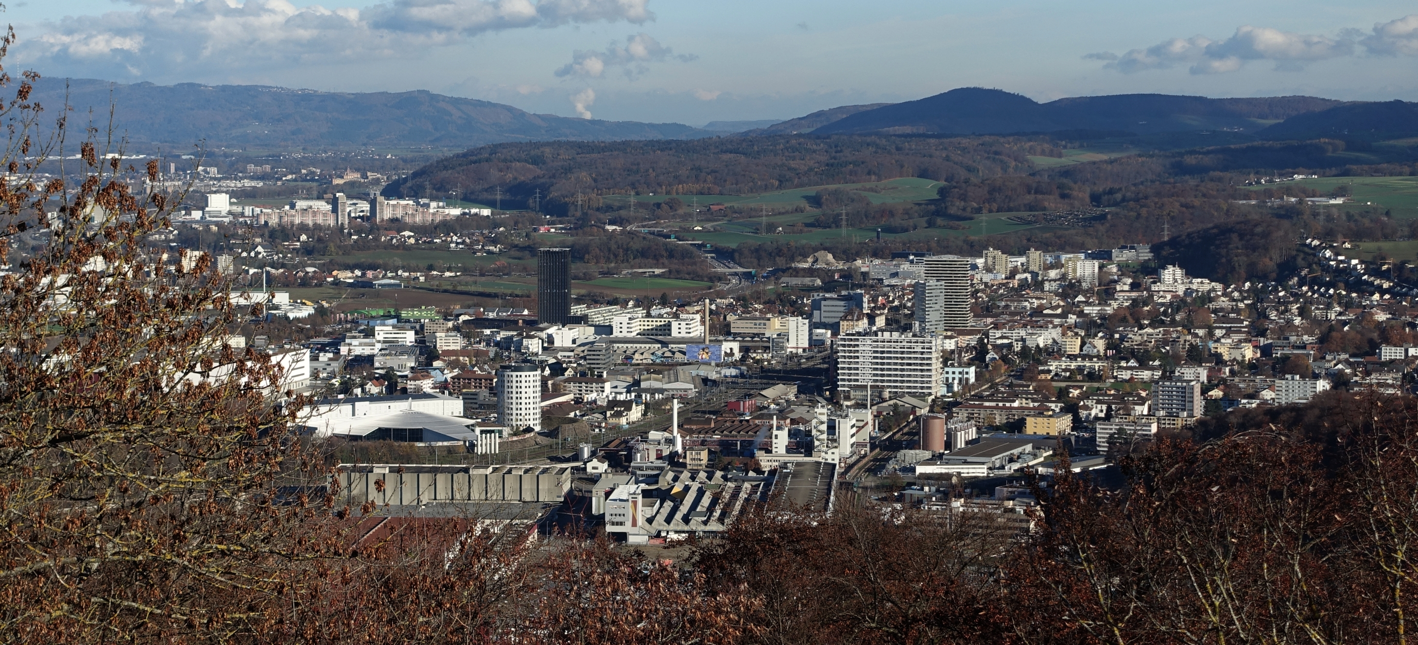 Panoramablick von der mittleren Ruine Wartenberg nach Pratteln